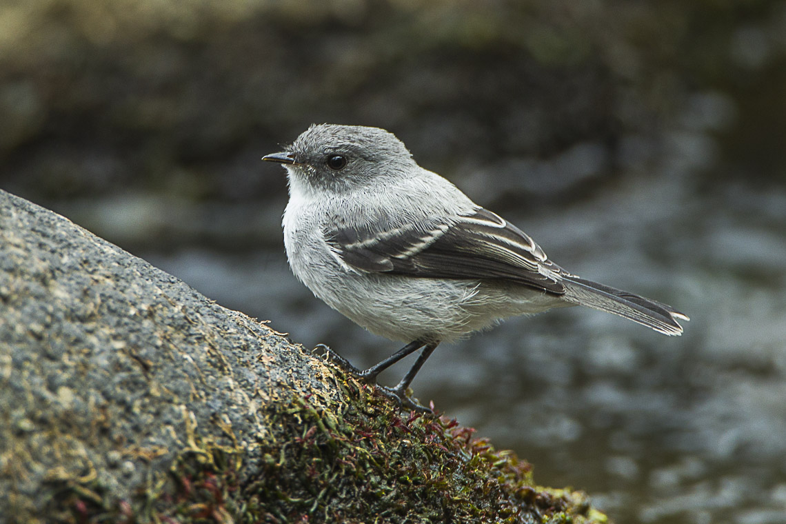 Torrent Tyrannulet - Colombia_S4E0594